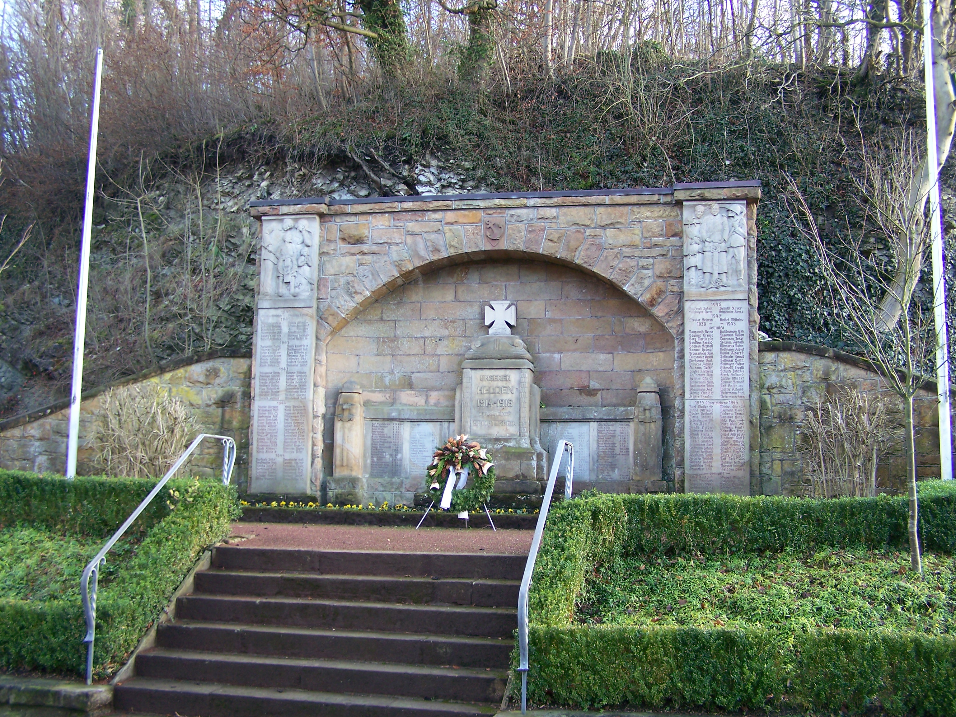 Kriegerehrenmal Brochterbeck This is a photograph of an architectural monument.